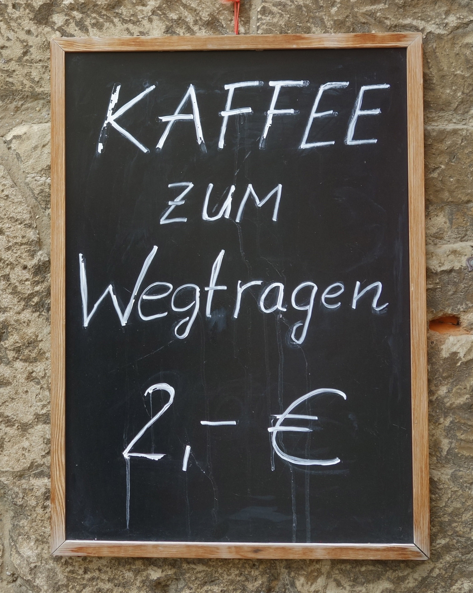 Werbetafel für "Coffee to Go" auf Schloss Neuenburg über der Unstrut (Freyburg): Kaffee zum Wegtragen 2,- €